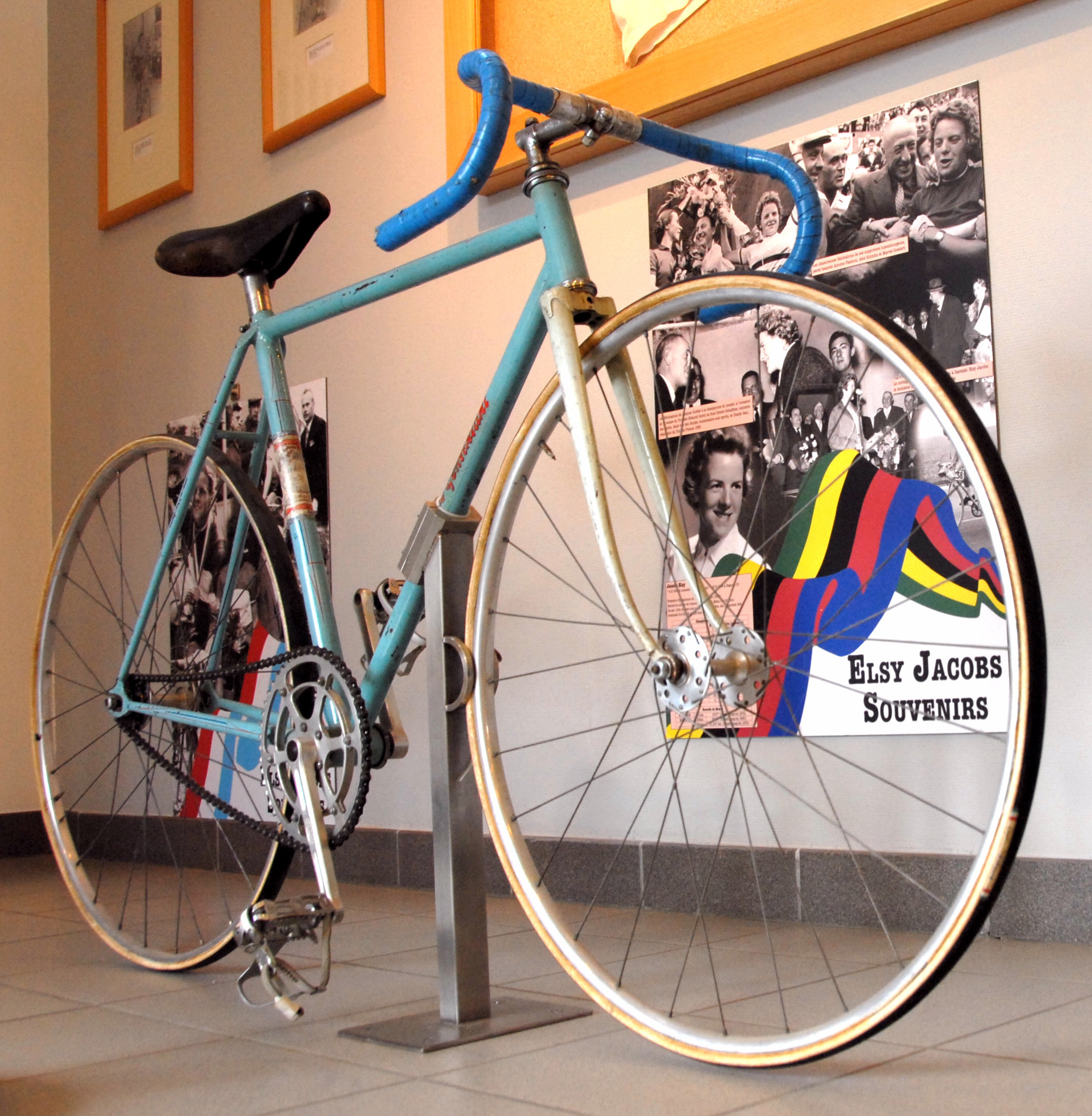 Vëlo vum Elsy Jacobs am Centre Sportif Elsy Jacobs zu Garnech.